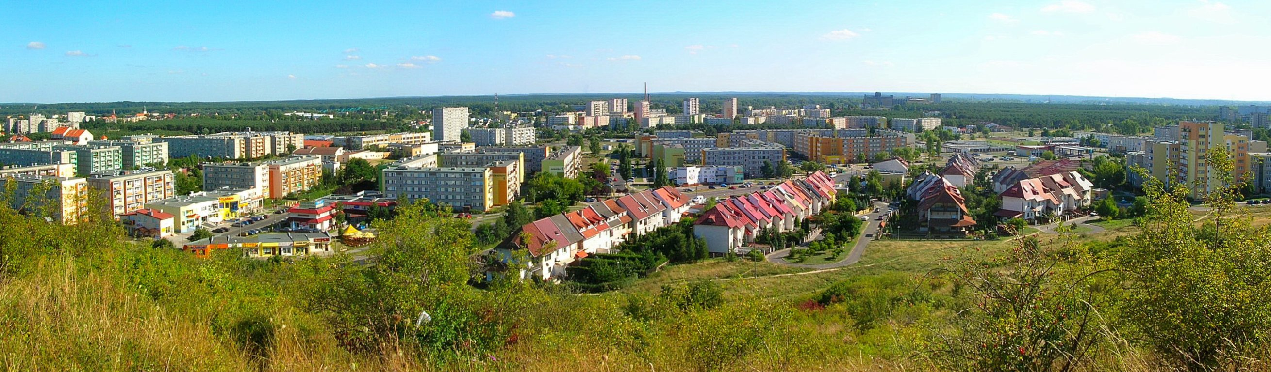 Panorama ze Zbocza Fordońskiego